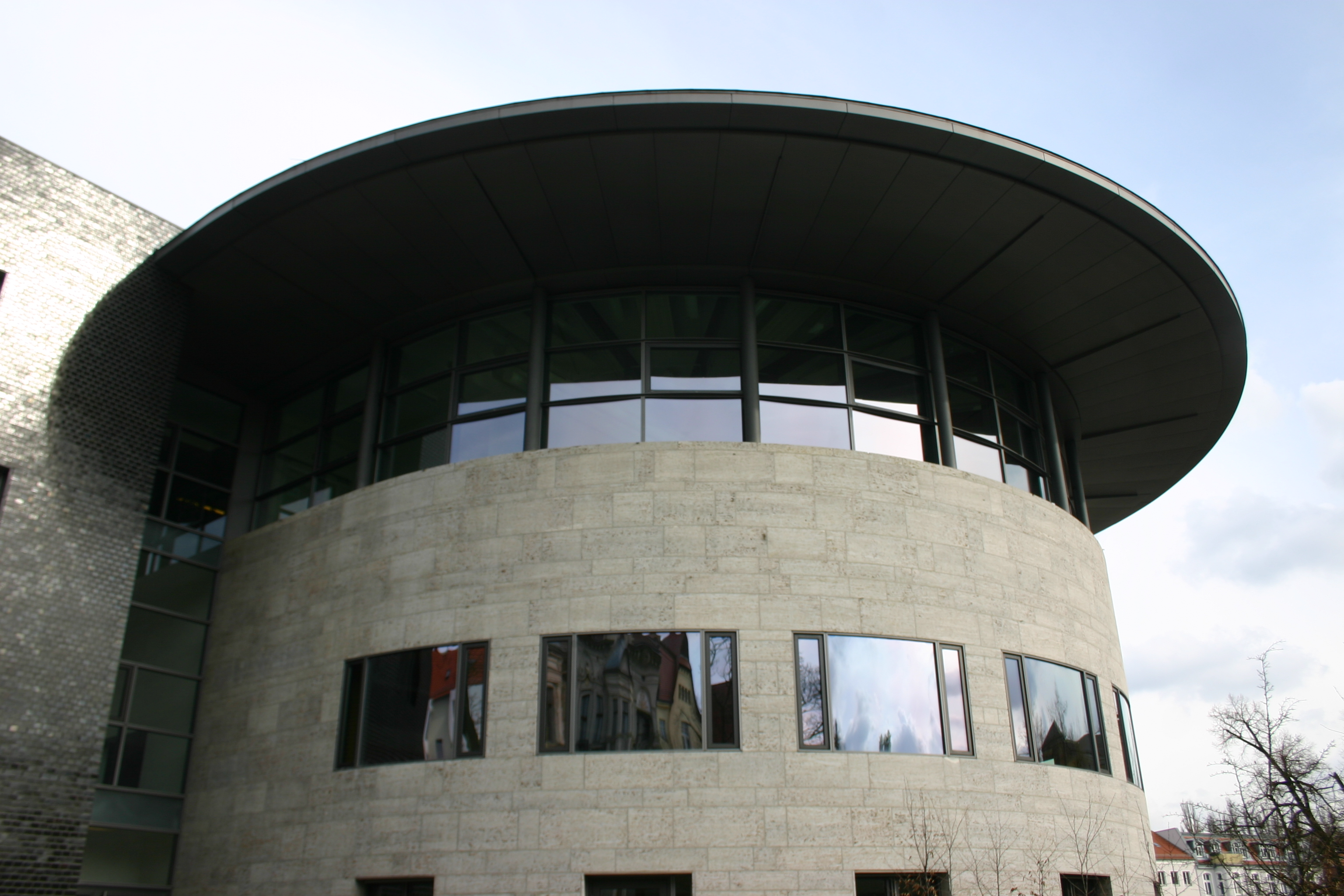 Frankfurt (Oder), Kleistforum